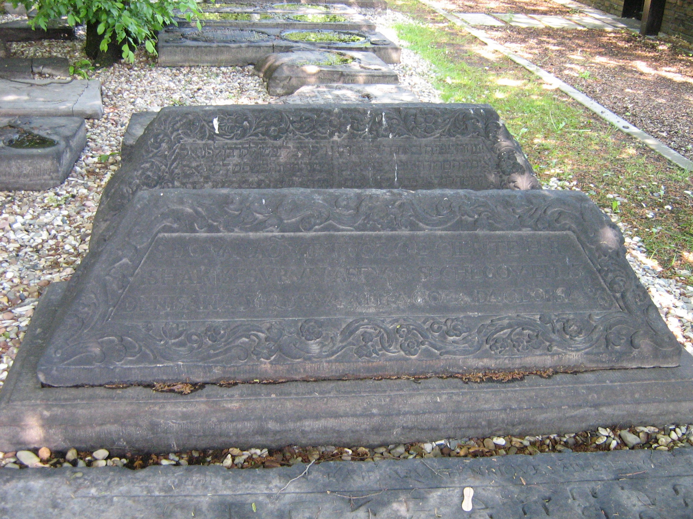 Jüdischer Friedhof/ Jewish Cemetery Hamburg Altona Königstraße: בית עלמין סְפָרַדִּים